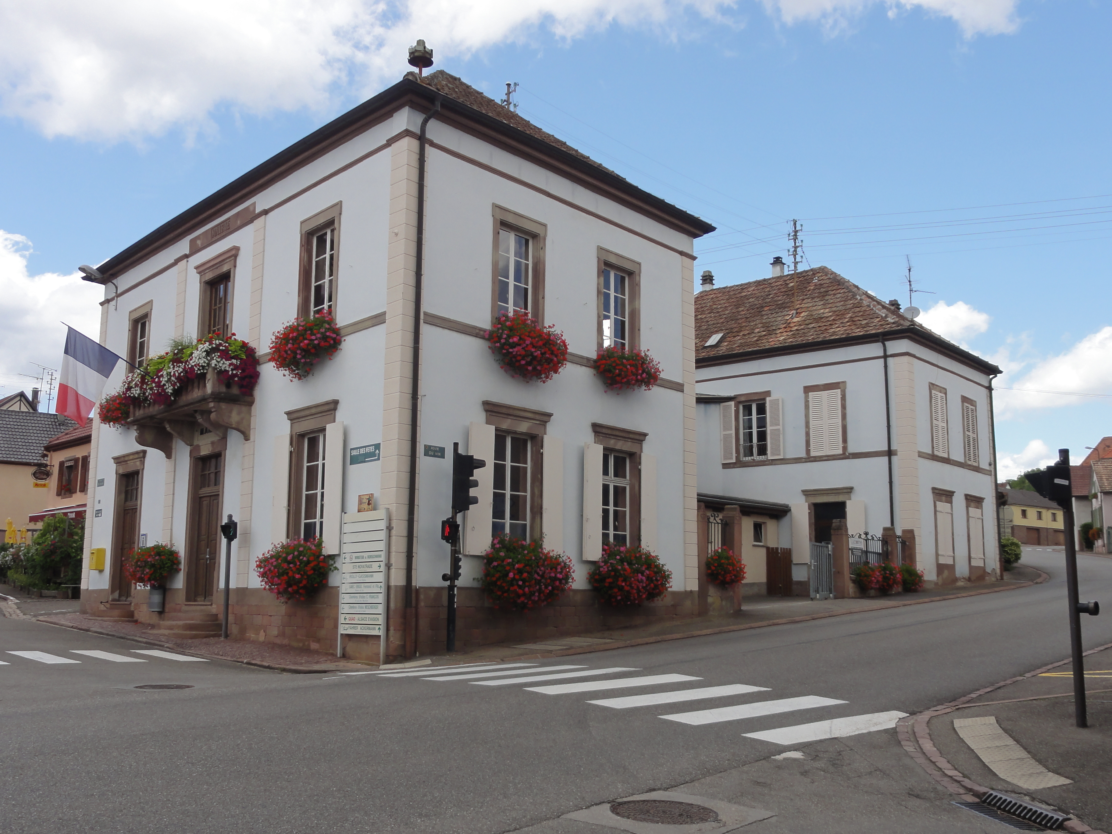 Alsace, Haut-Rhin, Rorschwihr, Mairie.